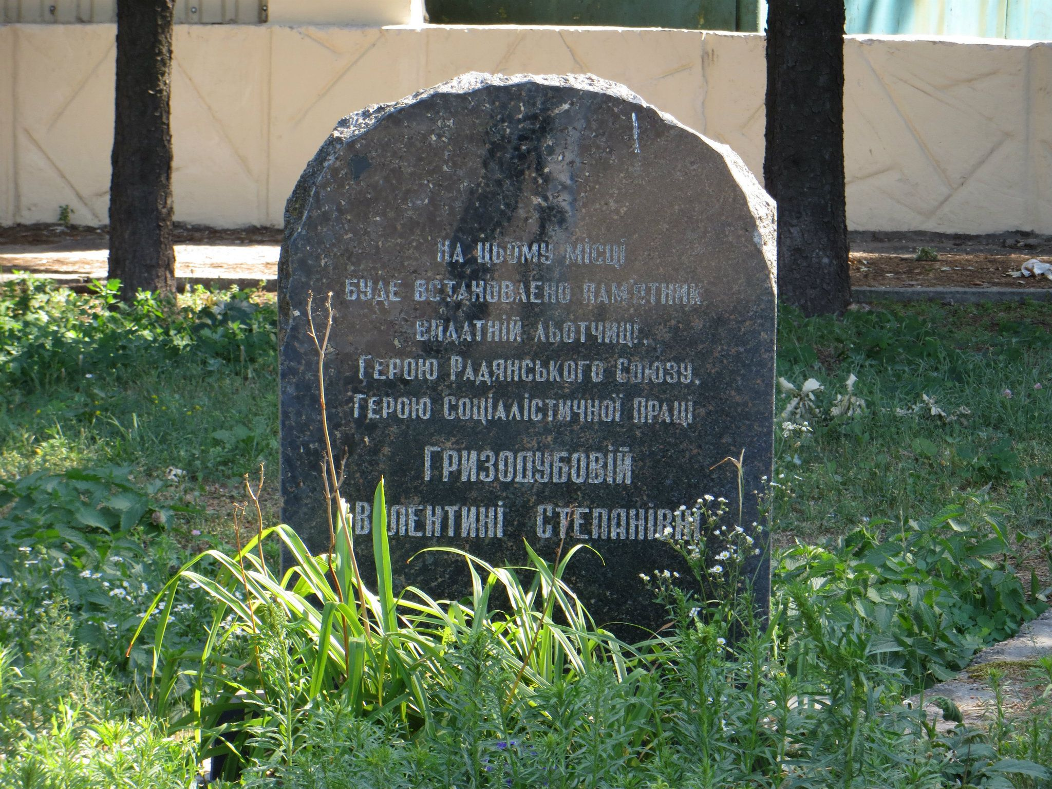 Московский проспект, 94